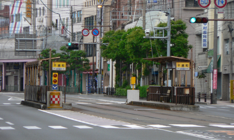 長崎電気軌道、千歳町電停